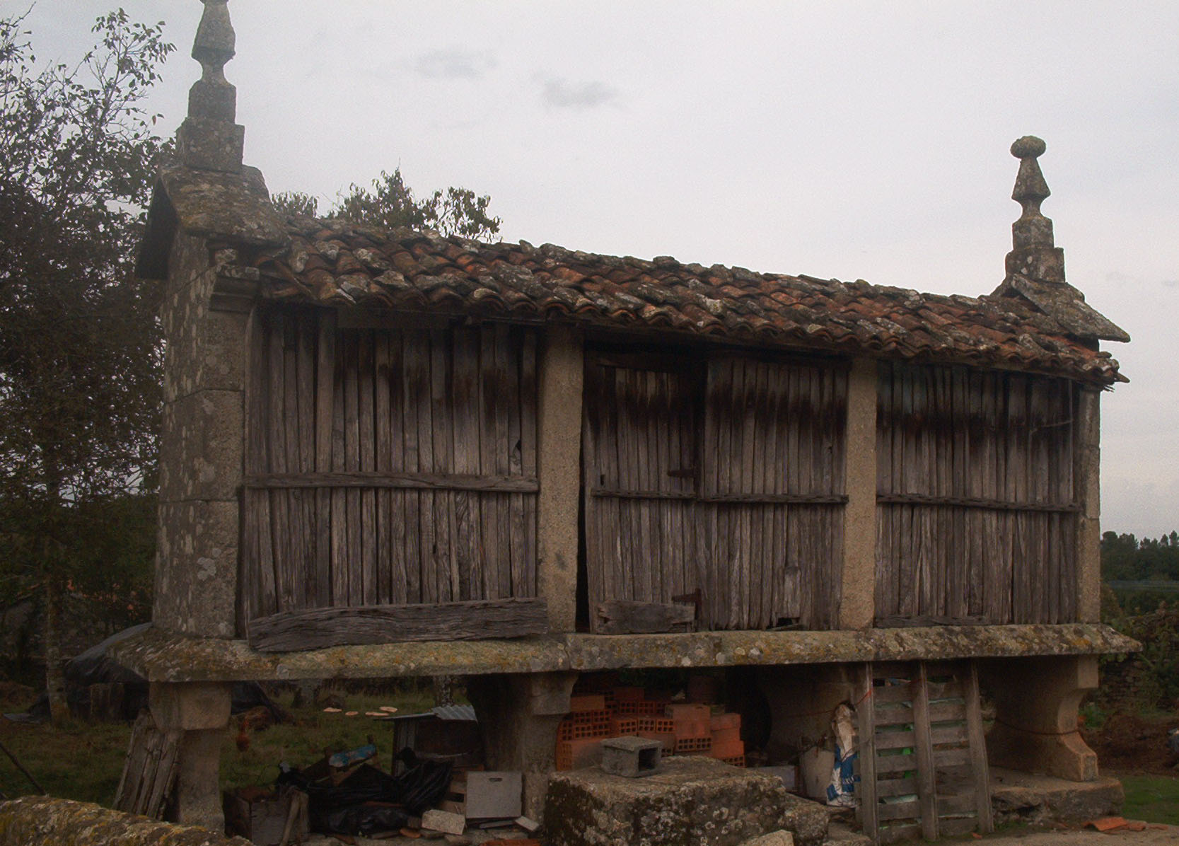 Hórreo de tipo mahía, con tres claros, nave elevada sobre leve soleira e catro cepas de canteiría. Cuberta de tella do país (a máis recurrente na Ulloa) e adornado con dous lampións que conforman tres figuras xeométricas: prisma, pirámide e esfera. Ubicado no lugar de Peibás (Antas de Ulla)